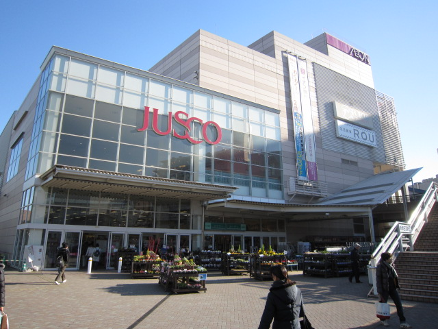 イオン津田沼ショッピングセンターの写真です。